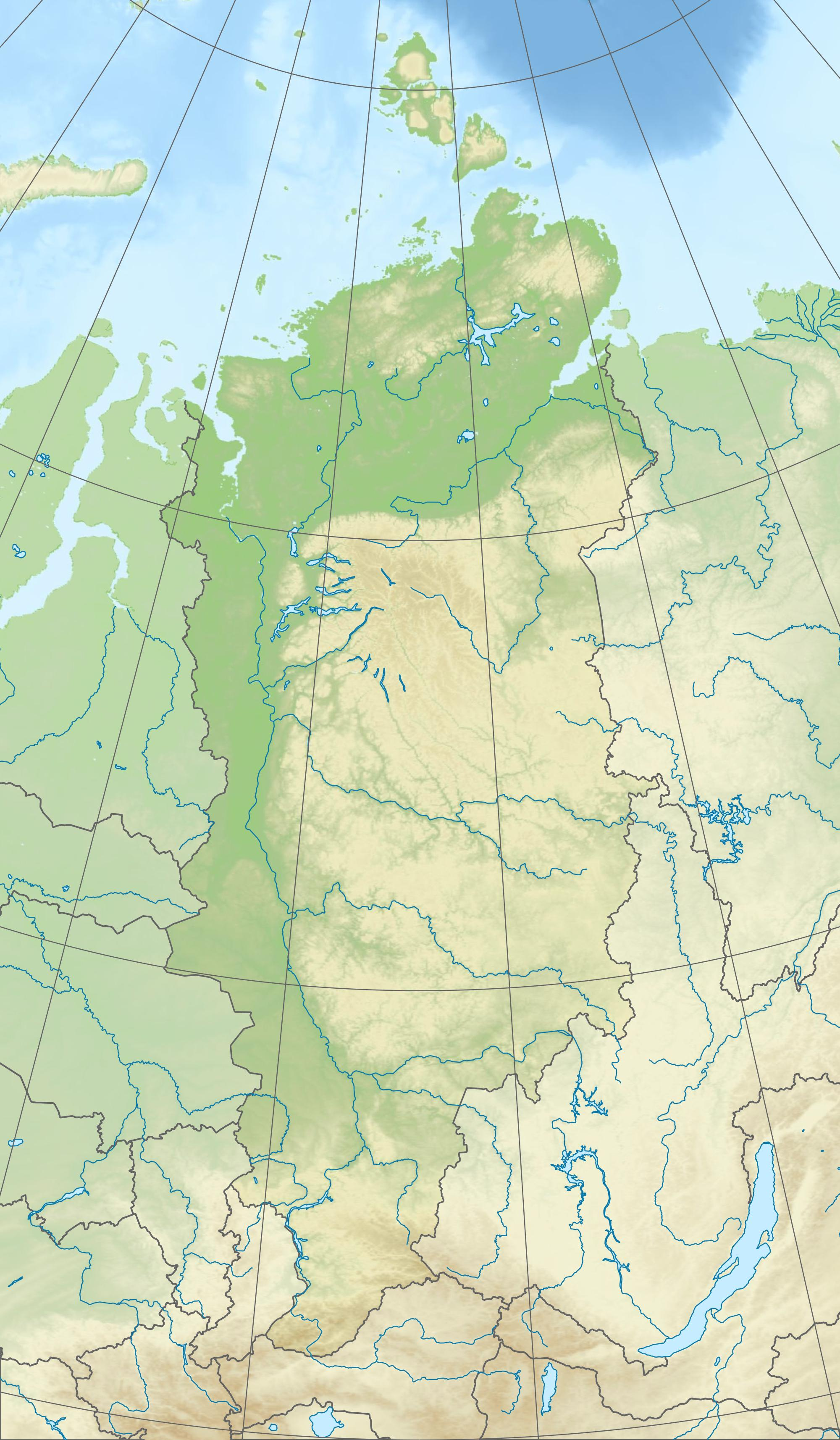 Физическая карта Красноярского края Проекция — коническая равнопромежуточная. первая стандартная параллель — 58°00'с.ш. вторая стандартная параллель — 74°00'с.ш. средний меридиан — 96°00'в.д.